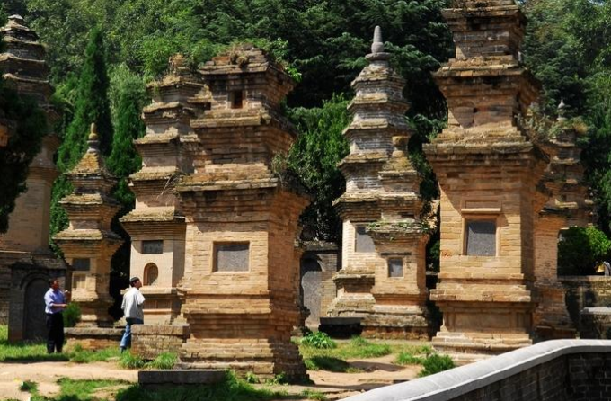 Shaolinsi